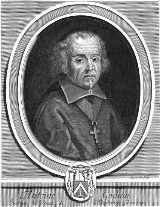 "Antoine Godeau, évêque de Vence, de l'Académie française."